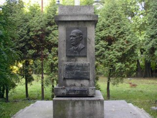 orginalny pomnik zdjęcie wykonane rok przed kradzieżą popiersia i tablicy